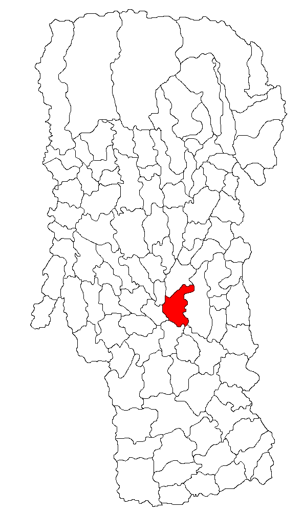 Categorie:Hărţi ale judeţului Argeş